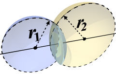 Viser de to radier der definerer formen på en sfærisk optisk linse. Lavet ved hjælp af raytracing af Peo den 19. januar 2004.